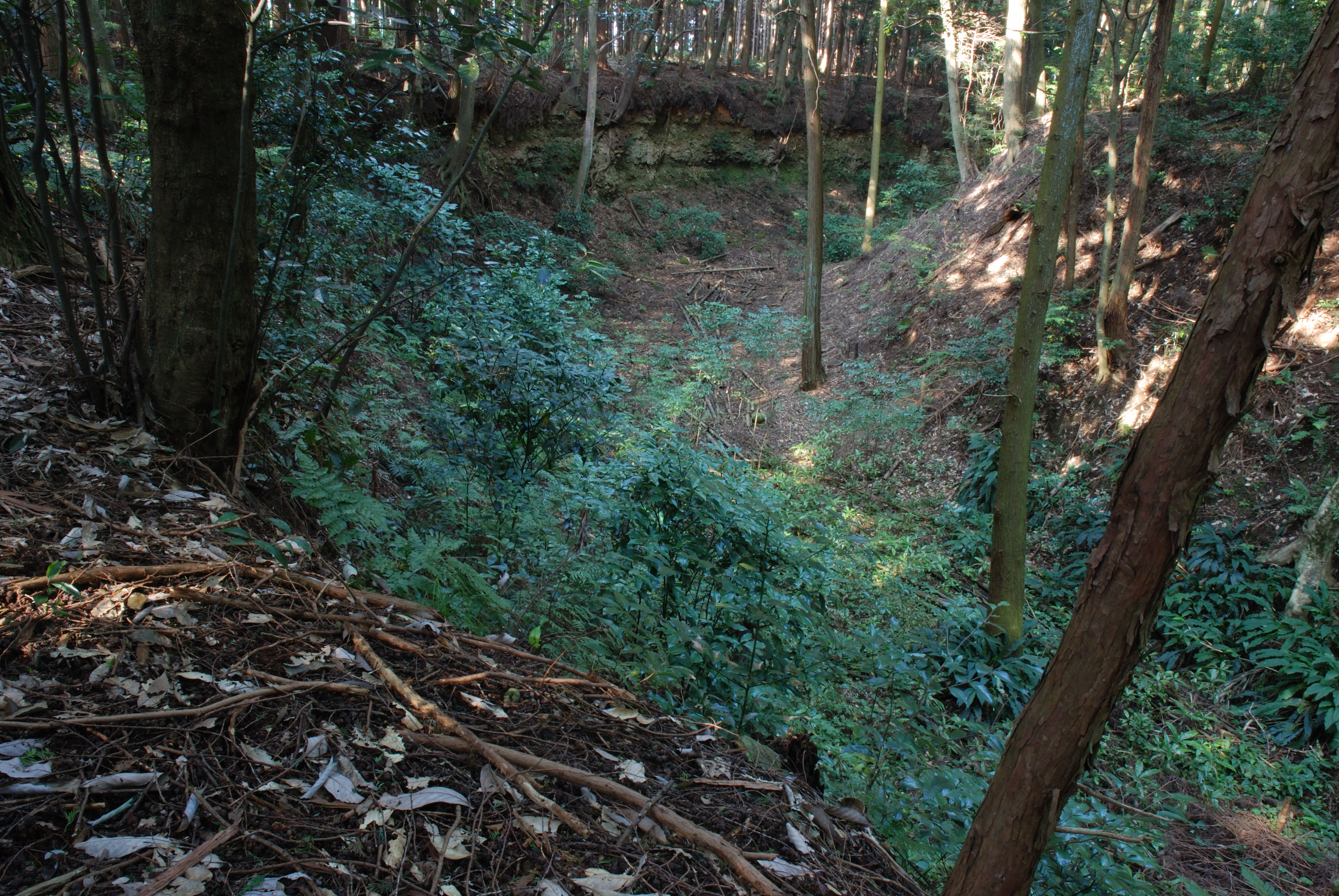 Suwahara Castle Ninomaru mikazukibori